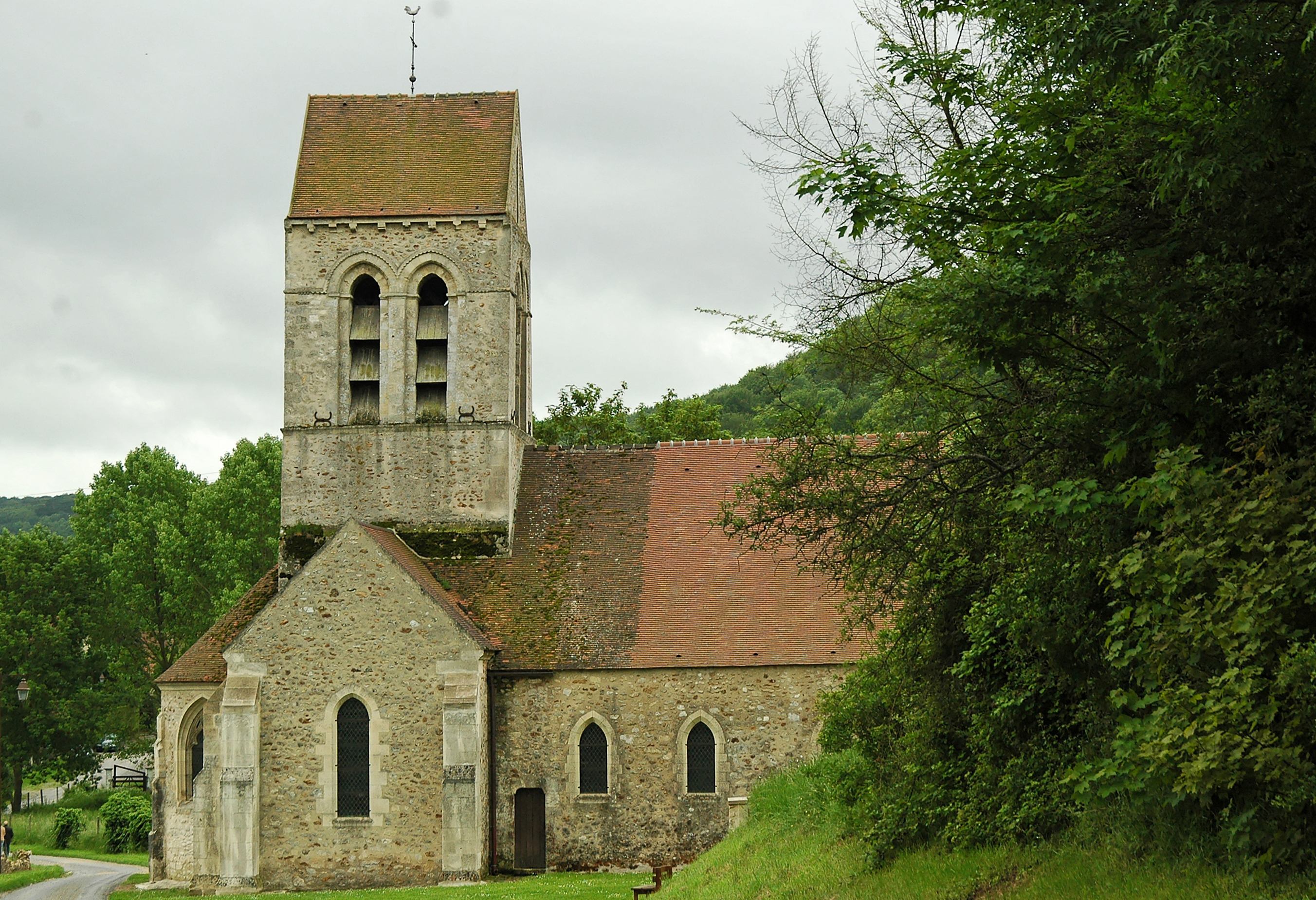 L'église de Courtemont-Varennes.